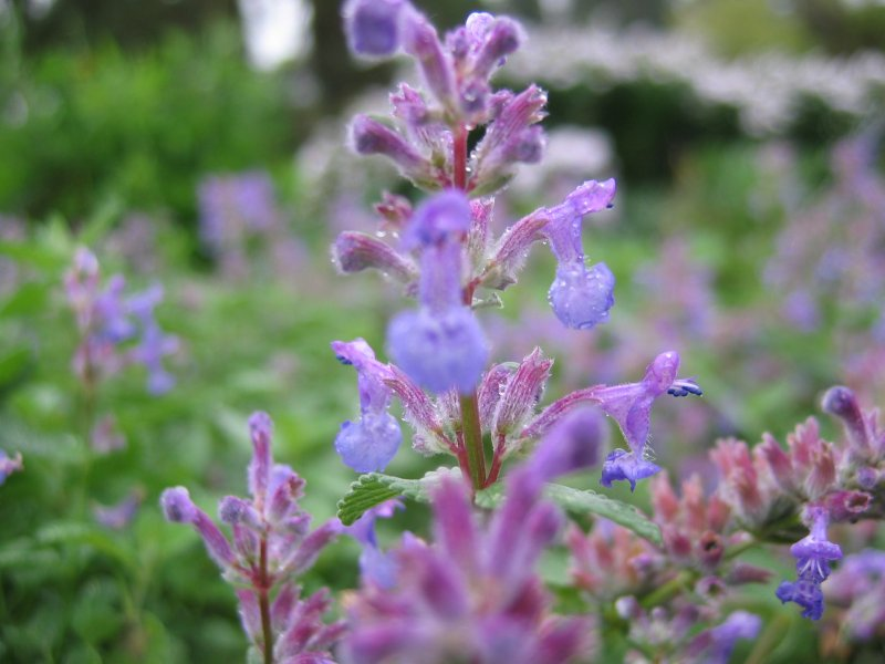 Mussins Katzenminze Nepeta mussinii